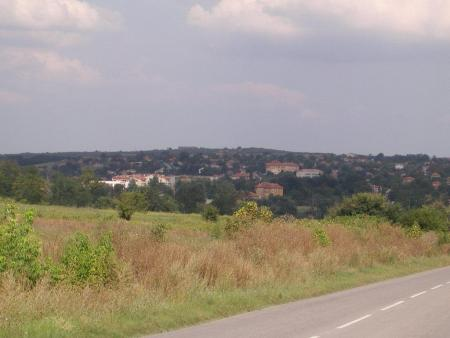 Снимка-пейзаж на село Бояново